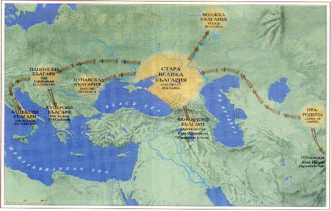 Bulgar subsequent migrations in Europe.